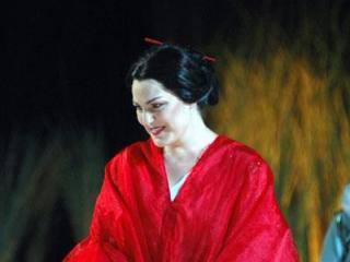 Foto di scena: Madama Butterfly